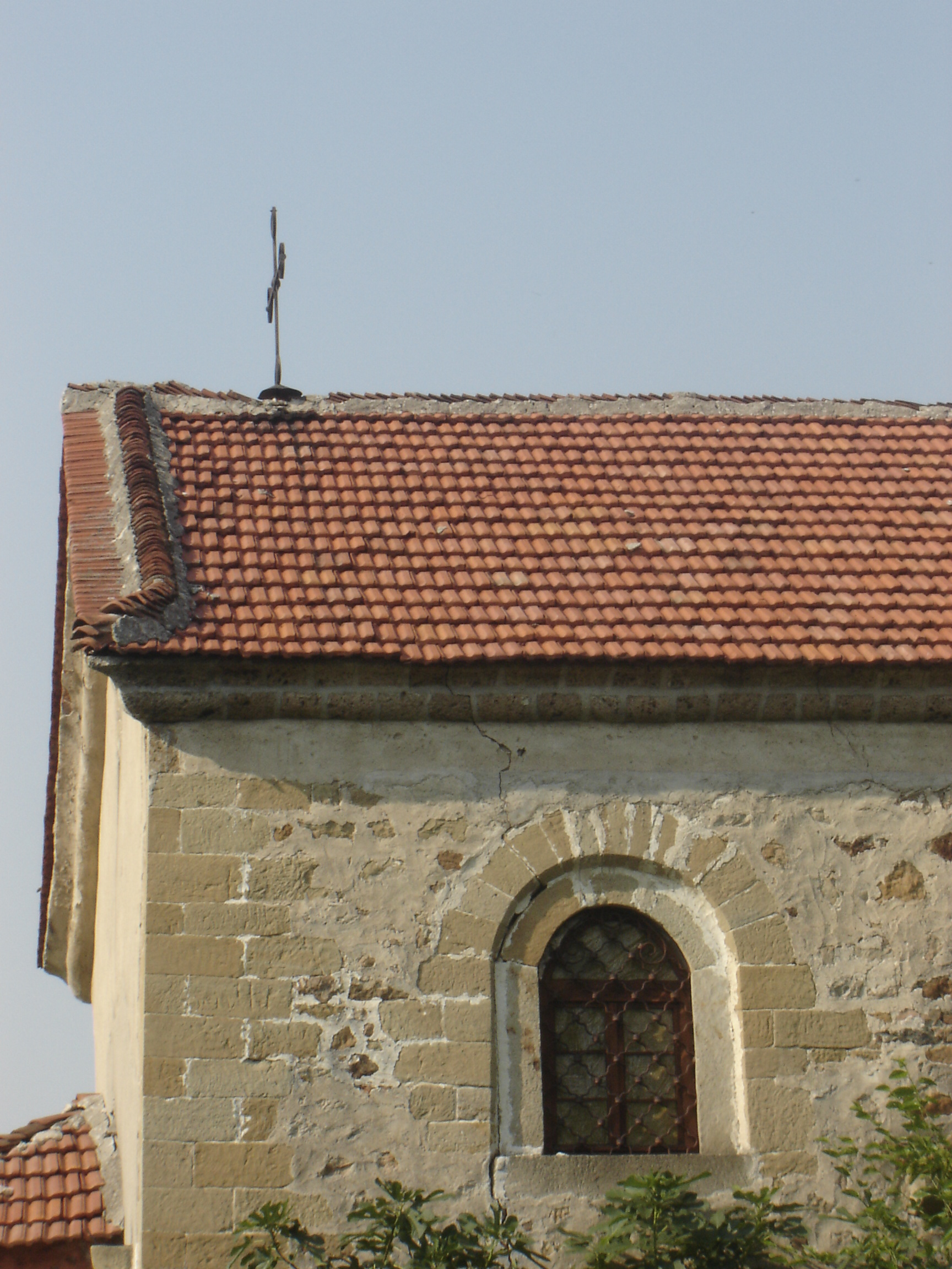 църквата в с.Верен